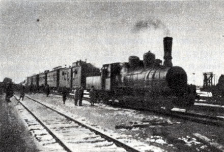 Первый рабочий поезд на новой железнодорожной ветке.